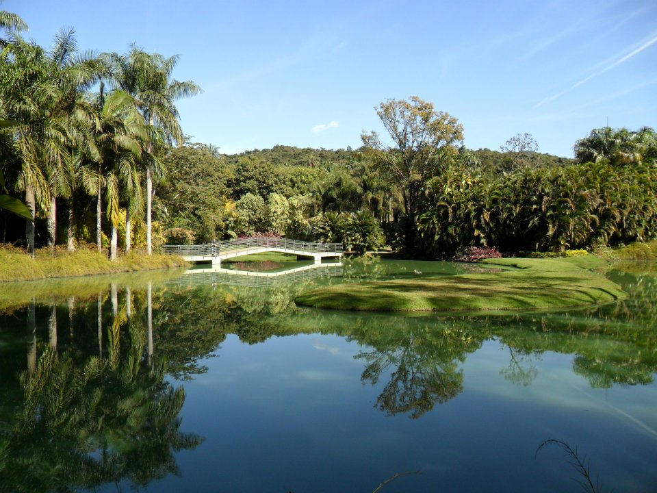 Inhotim